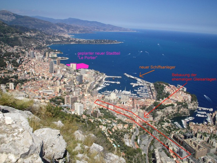 MonacoBauprojekte